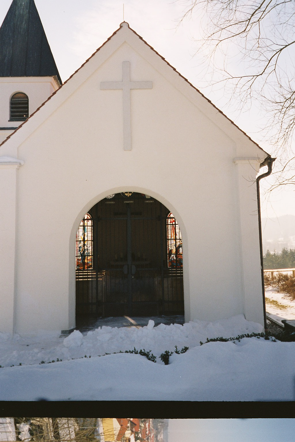 Die Guggenbergkapelle auf dem Guggenberg in Peißenberg